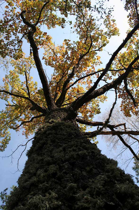 Старый дуб в Теллермановской роще